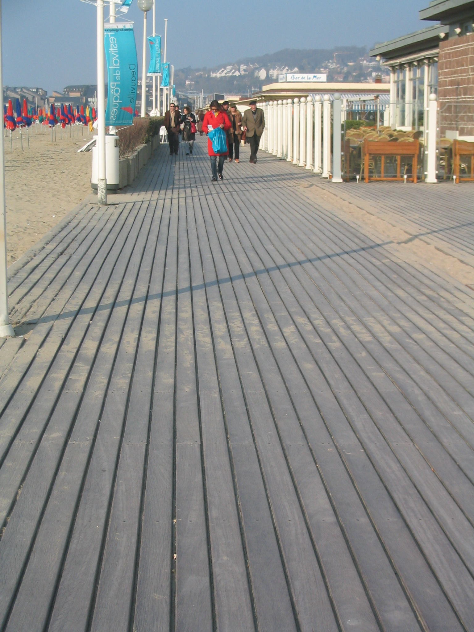 Les célèbres "planches" de Deauville (France) en azobé (Ochnaceae), un bois exotique imputrescible. Elles datent de 1923.